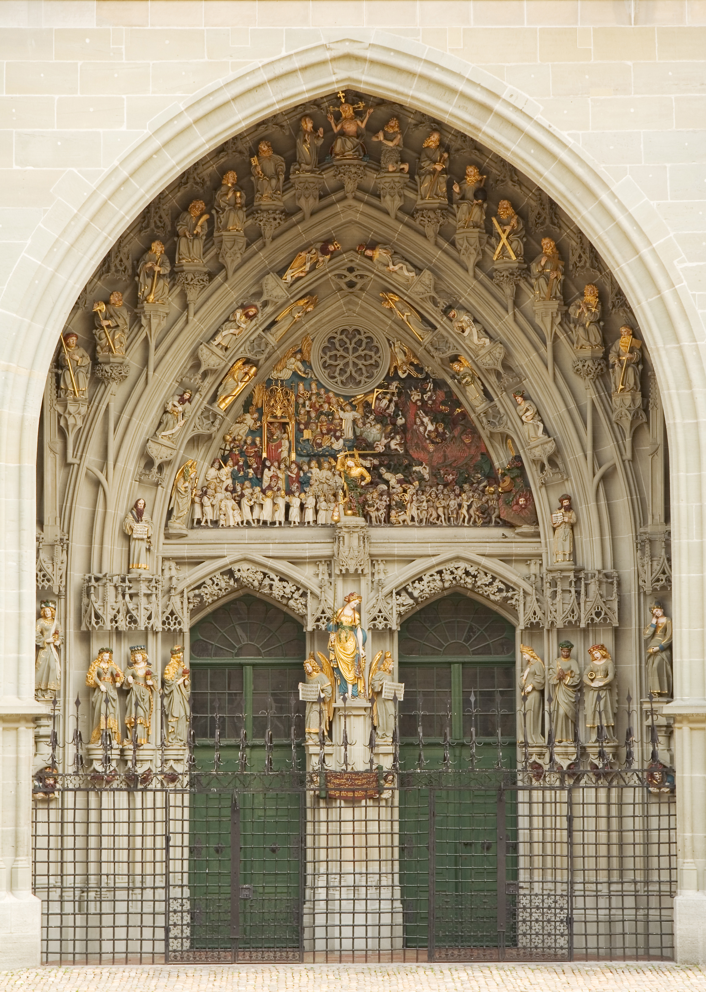 Portal des Berner Münsters